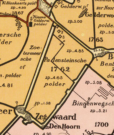 Palensteinsche_polder